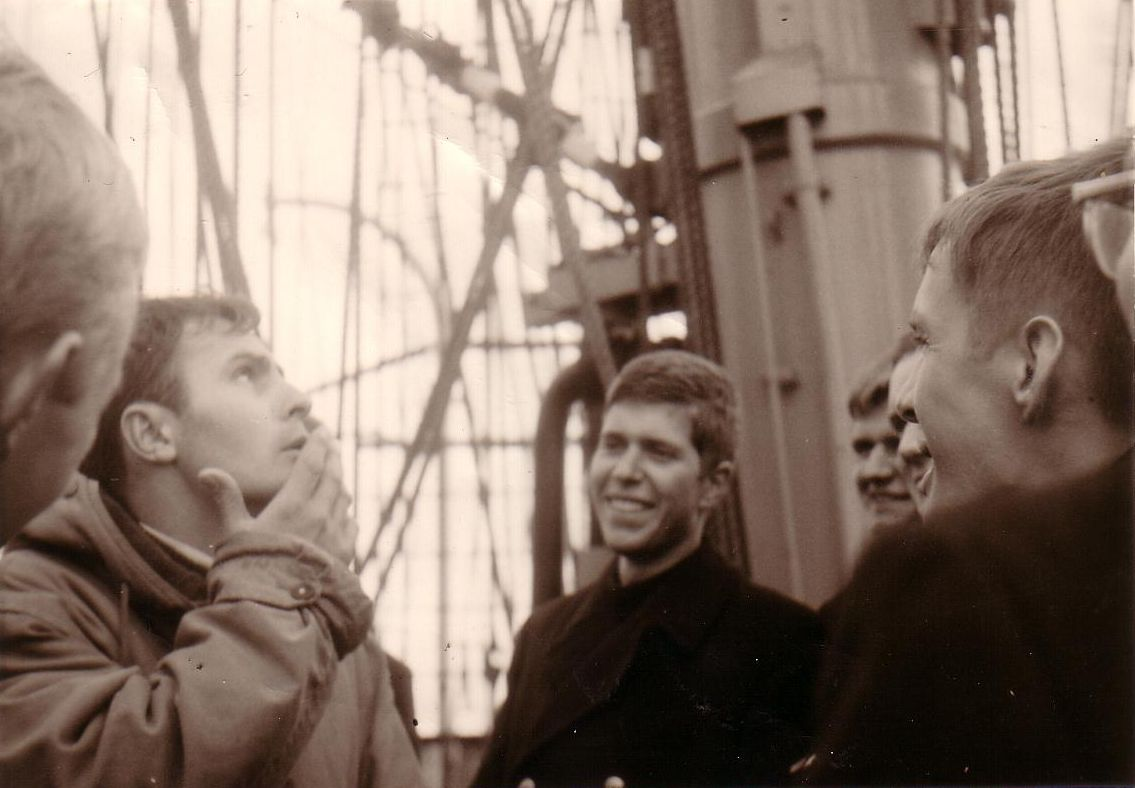 Auf dem Segelschulschiff Gorch Fock unterhält ein Maat die Kadetten mit "Geschichten von See".